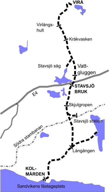 Nunnebanans dragning.